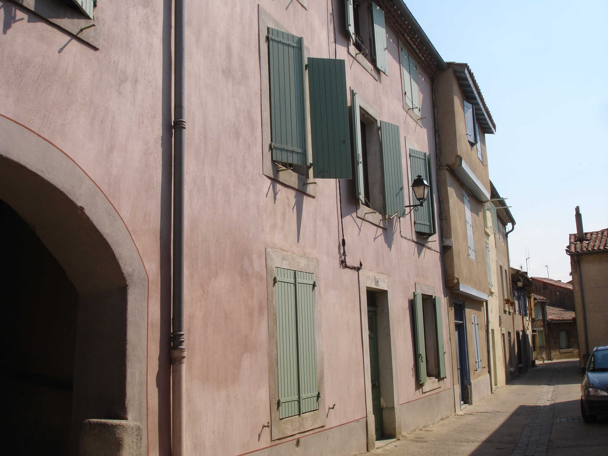 france, Aude (11), Carcassonne, quartier de la Trivalle